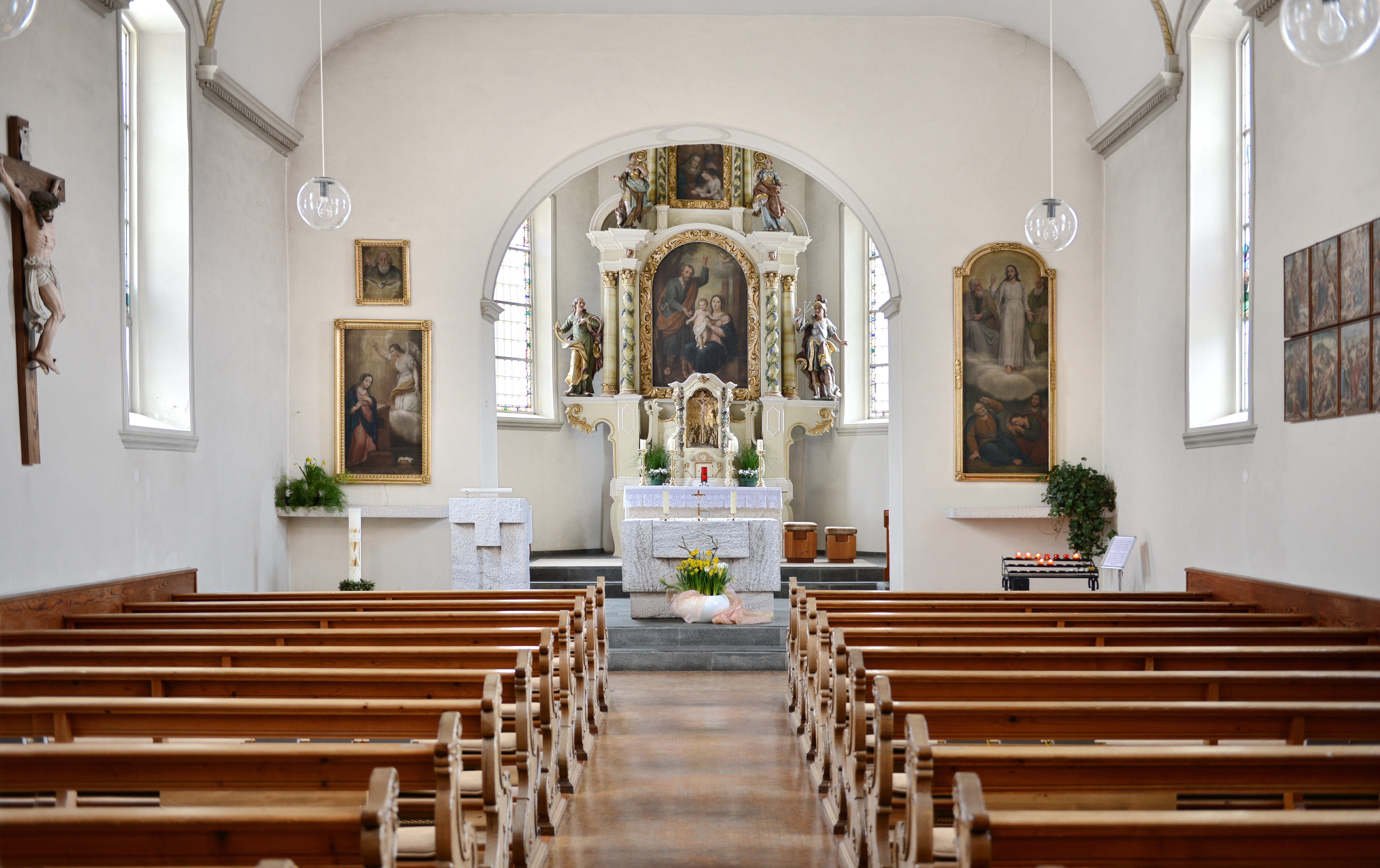 Kuratienkirche Hl. Josef, in Au-Rehmen. 1664 erbaut, Anfang 18. Jh. vergrößert, 1717 geweiht.